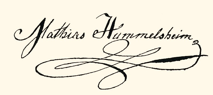 Unterschrift von Matthias Hummelsheim, Kerzenfabrikant aus Köln (gestorben 1830)